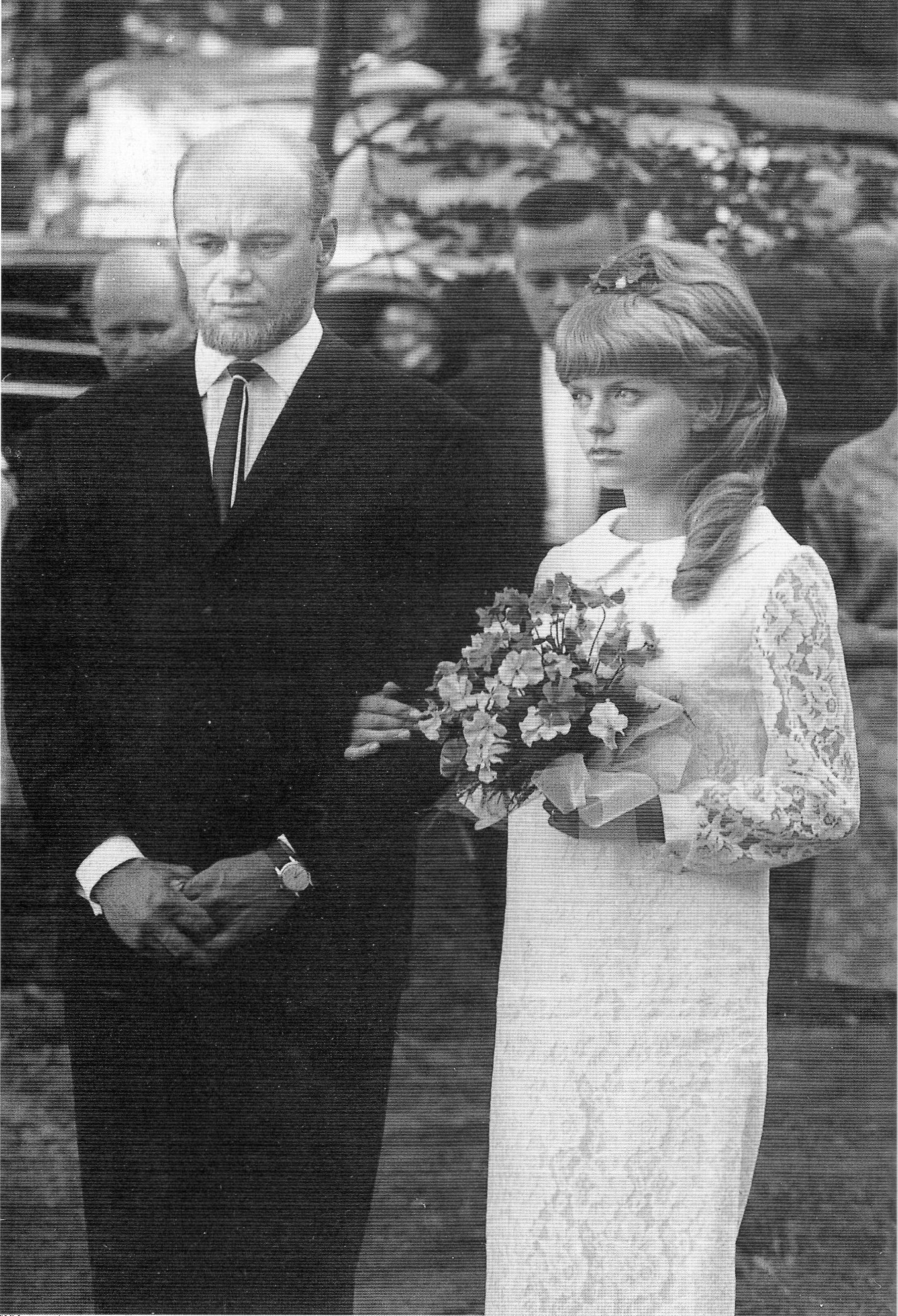 Suomalainen suomalainen viihdetaiteilija, koomikko, näyttelijä, käsikirjoittaja, elokuvaohjaaja, tuottaja, lauluntekijä ja keksijä Spede Pasanen (1930-2001) ja hänen vaimonsa Pirjo Vainimäki hääpäivänään 14. heinäkuuta 1965 Kuopion Sorsasalossa.